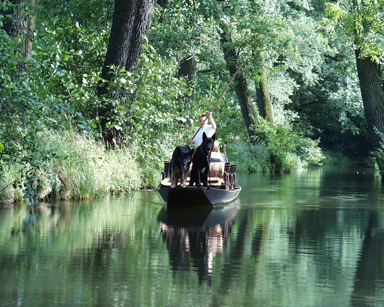 Ein Kahn bei Burg im Spreewald